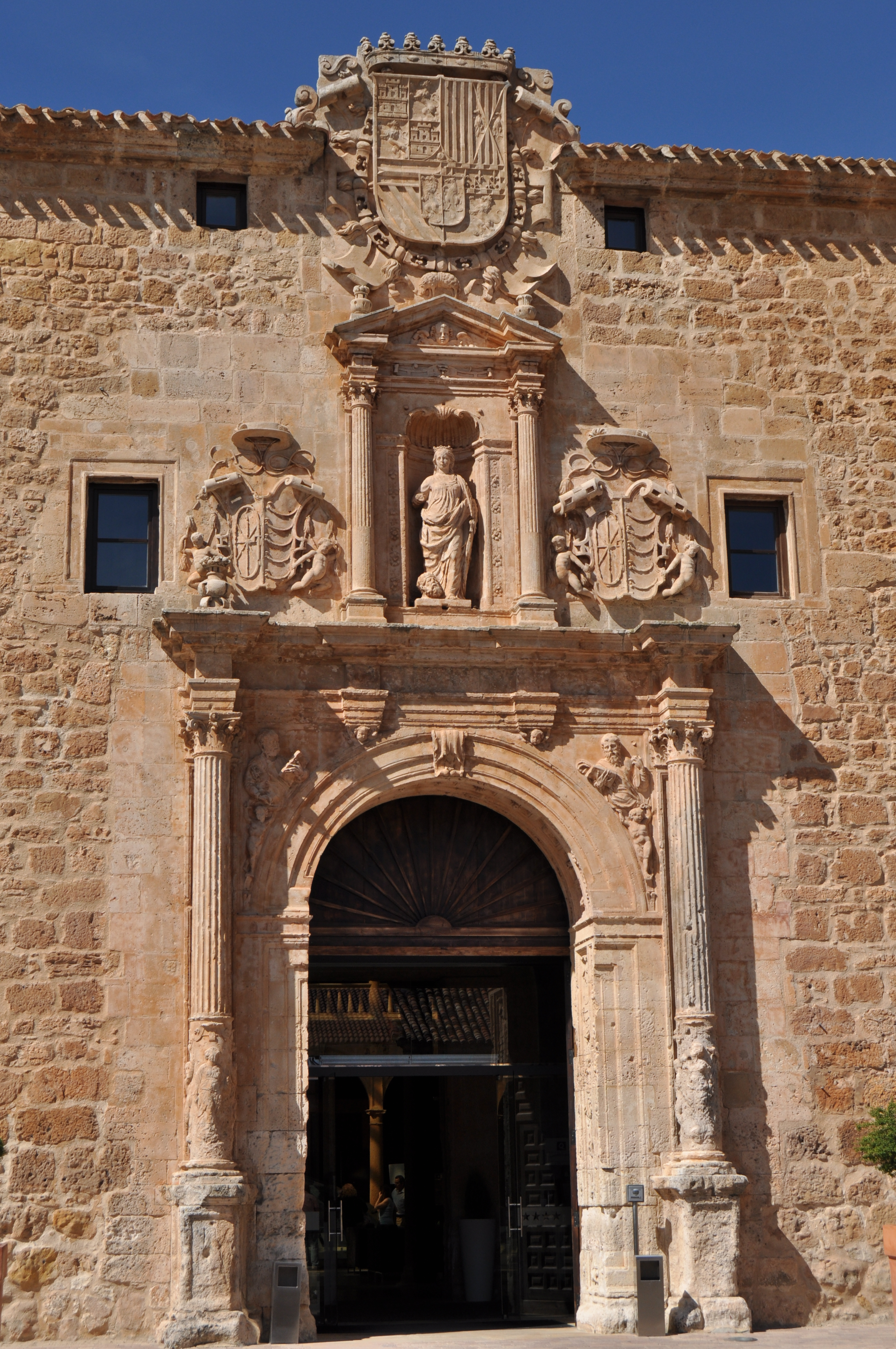 El Burgo de Osma - 011